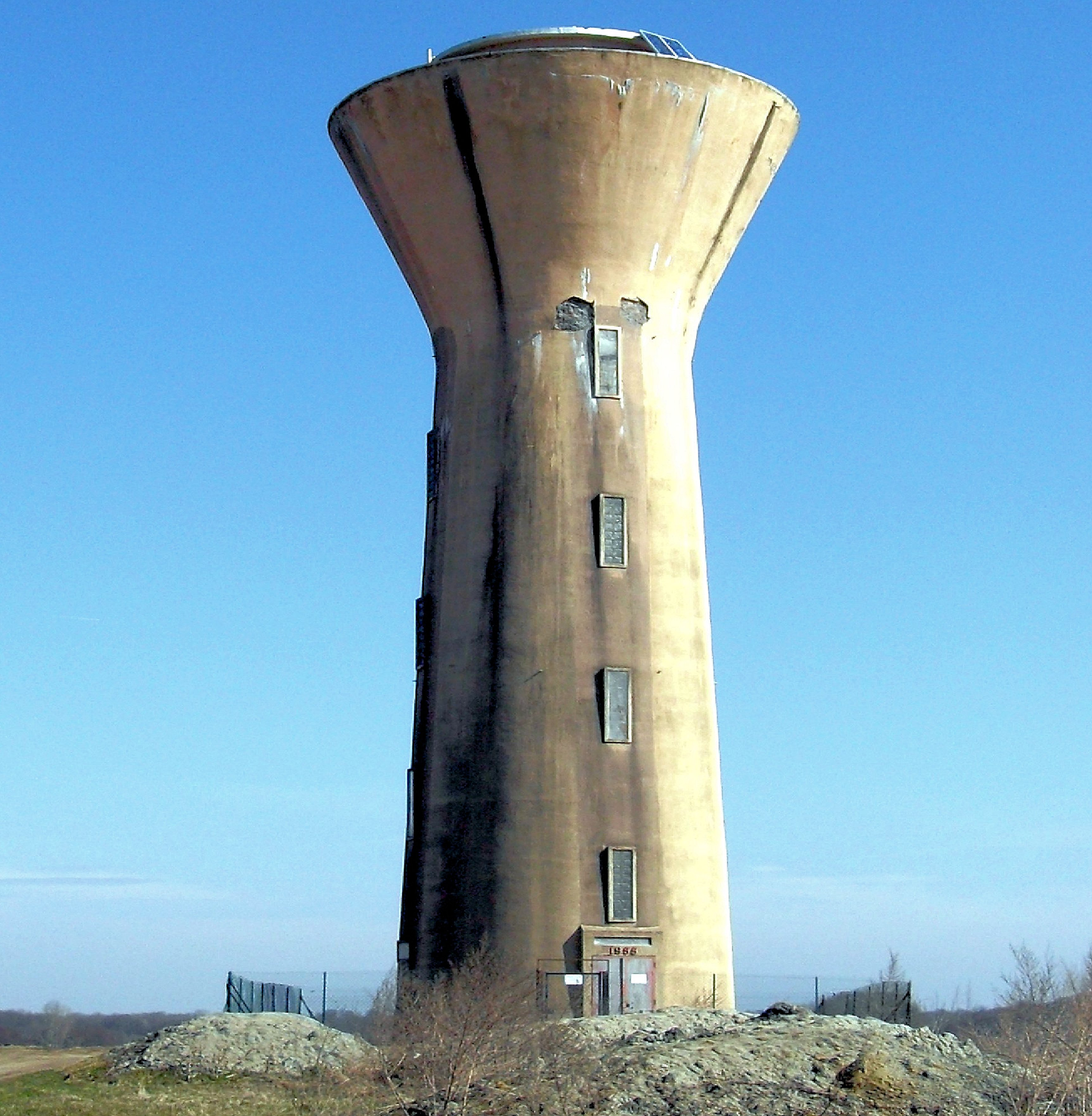 Le château d'Eau de Chavannes-les-Grands